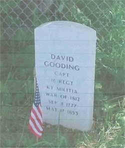 Seorang pahlawan yang gugur